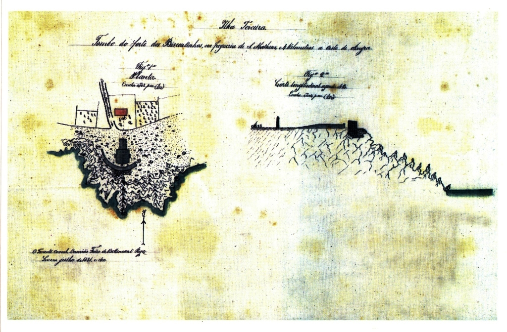 "Tombo do forte dos Biscoutinhos, na freguezia de S. Matheus", Ilha Terceira (Açores), Portugal.